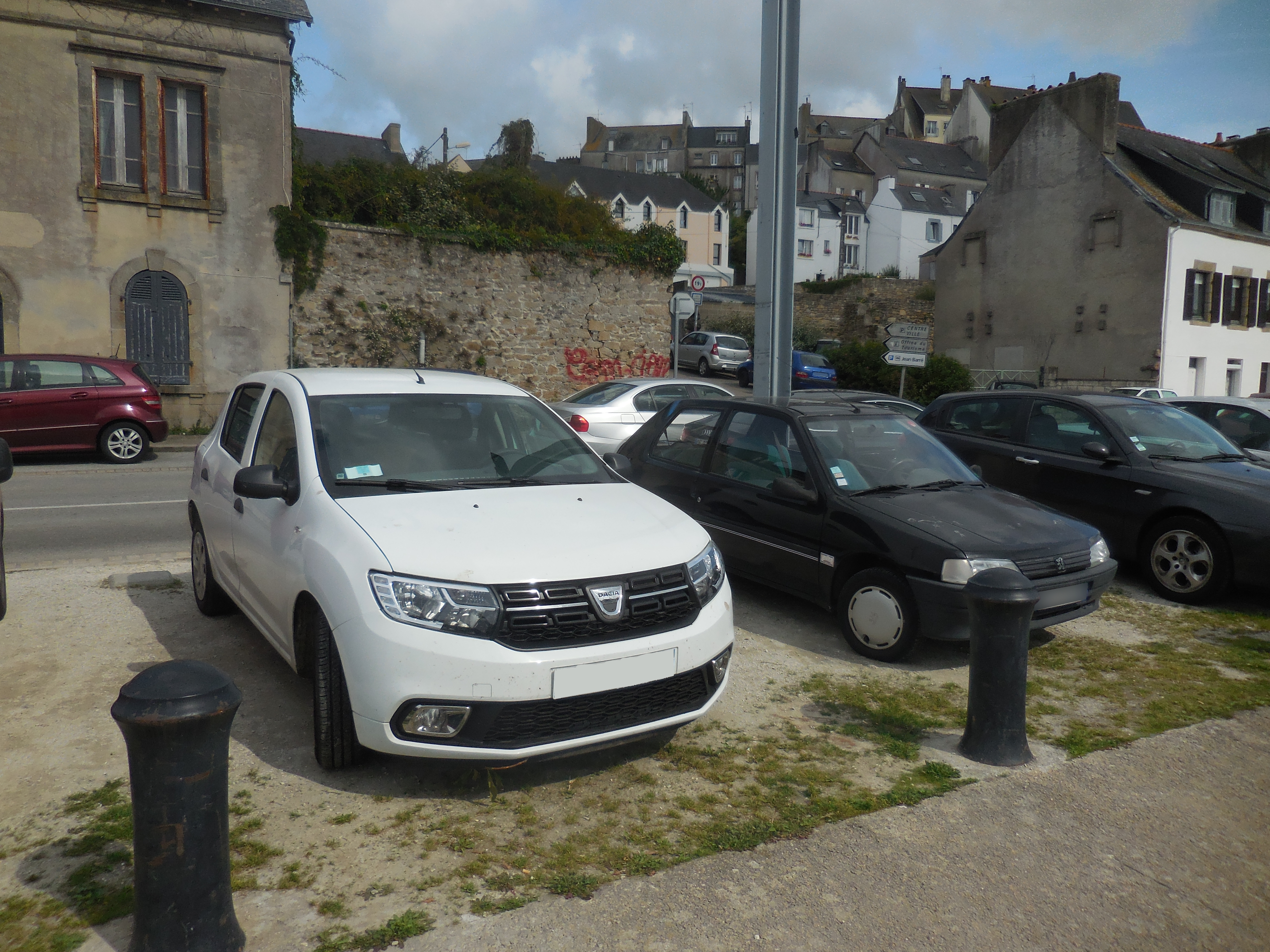 Dacia Sandero II (restylage de 2016)